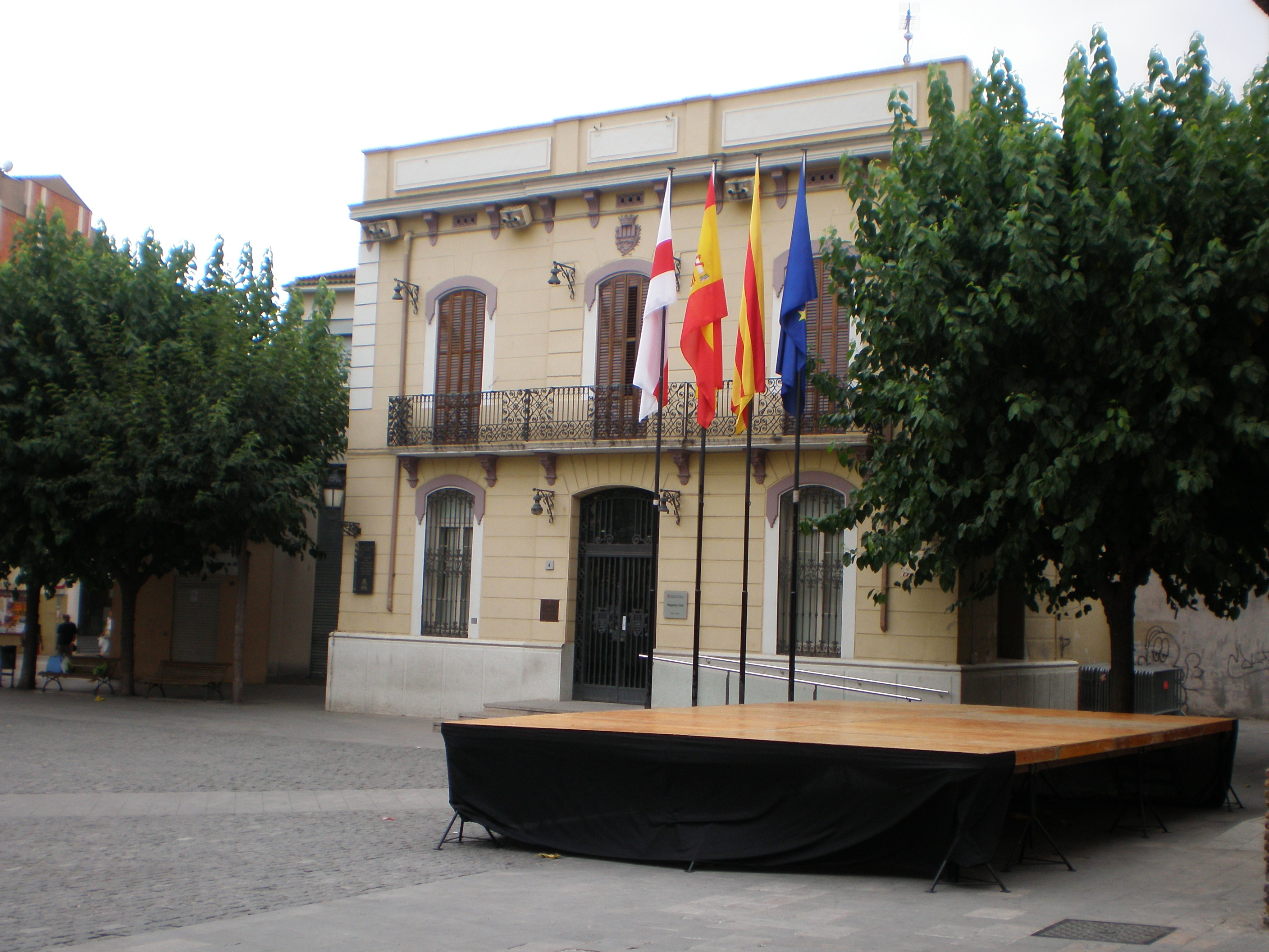 Antiga Casa de la Vila de Mollet del Vallès.